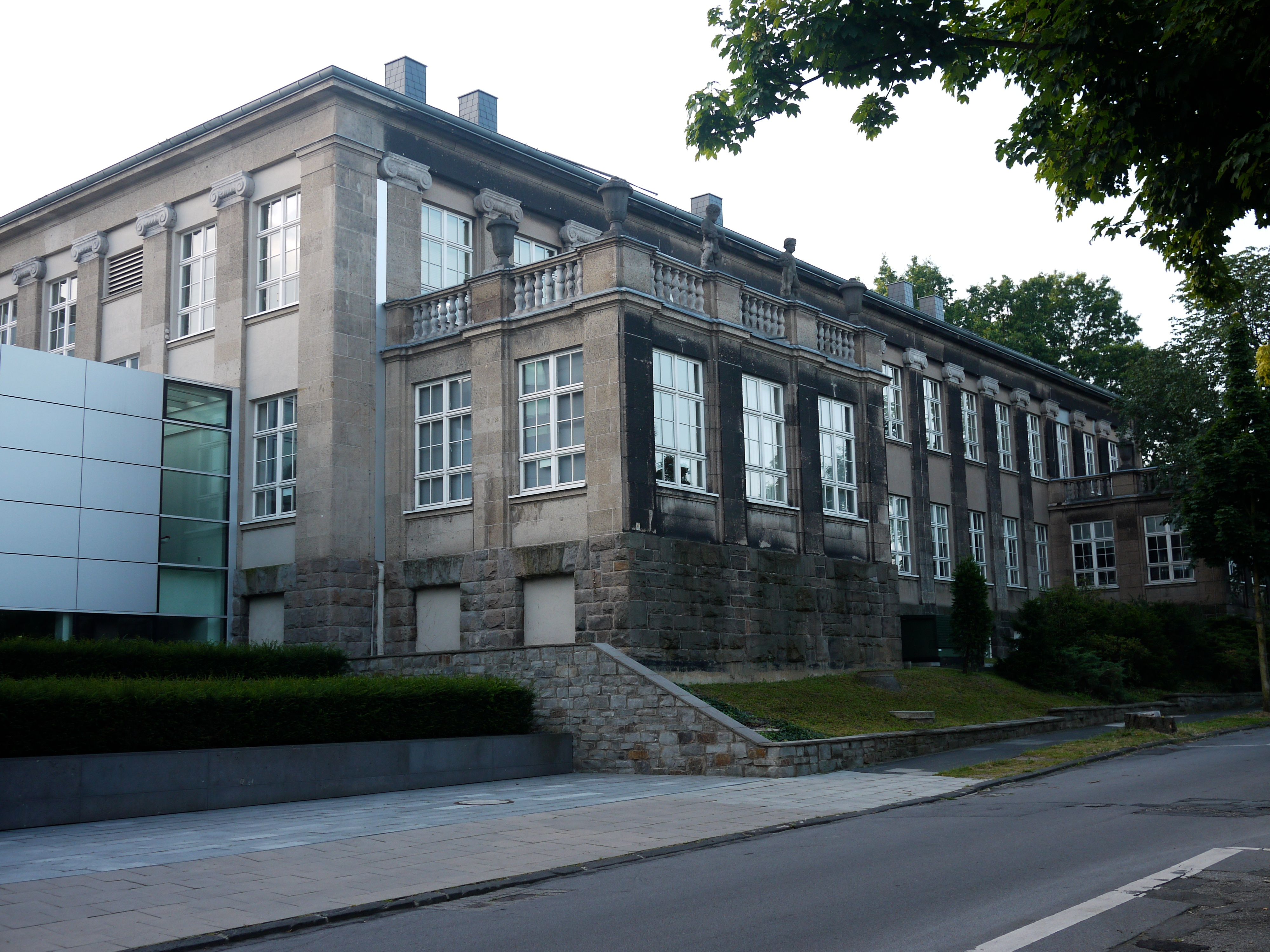 Max-Planck-Institut für Kohlenforschung, Mülheim an der Ruhr